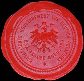 Siegelmarke Titel: Kolonial - Marke Beschreibung: Kaiserliches Gouvernement von Deutsch Ostafrika - Bezirksamt Morogoro. Marktwert ca. 60,- Euro Ort: Größe: 4